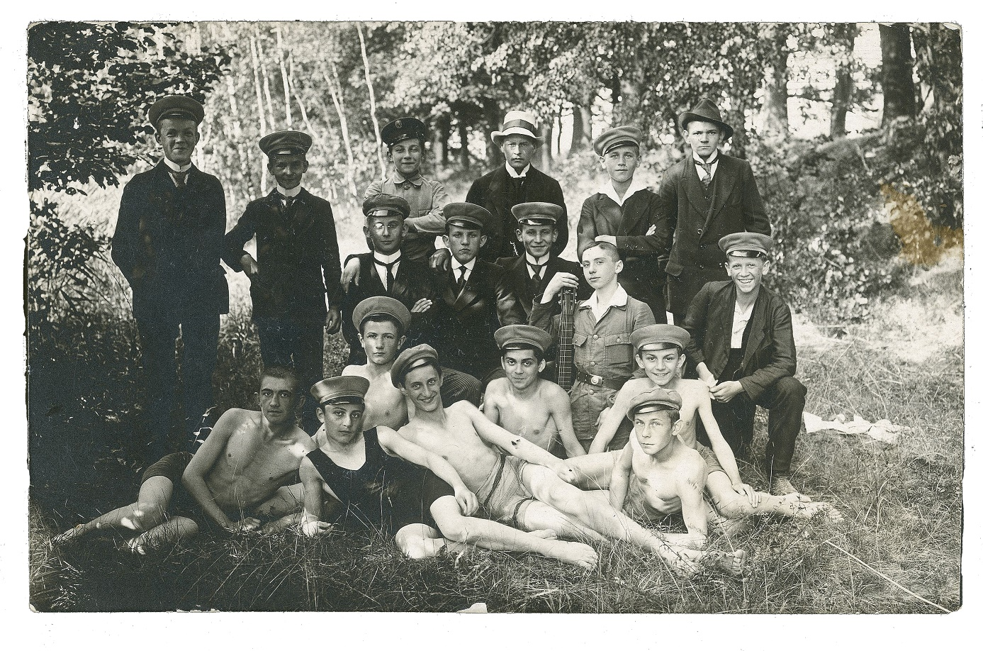 סניף תנועת הנוער "בלאו וויס" ברטיבור